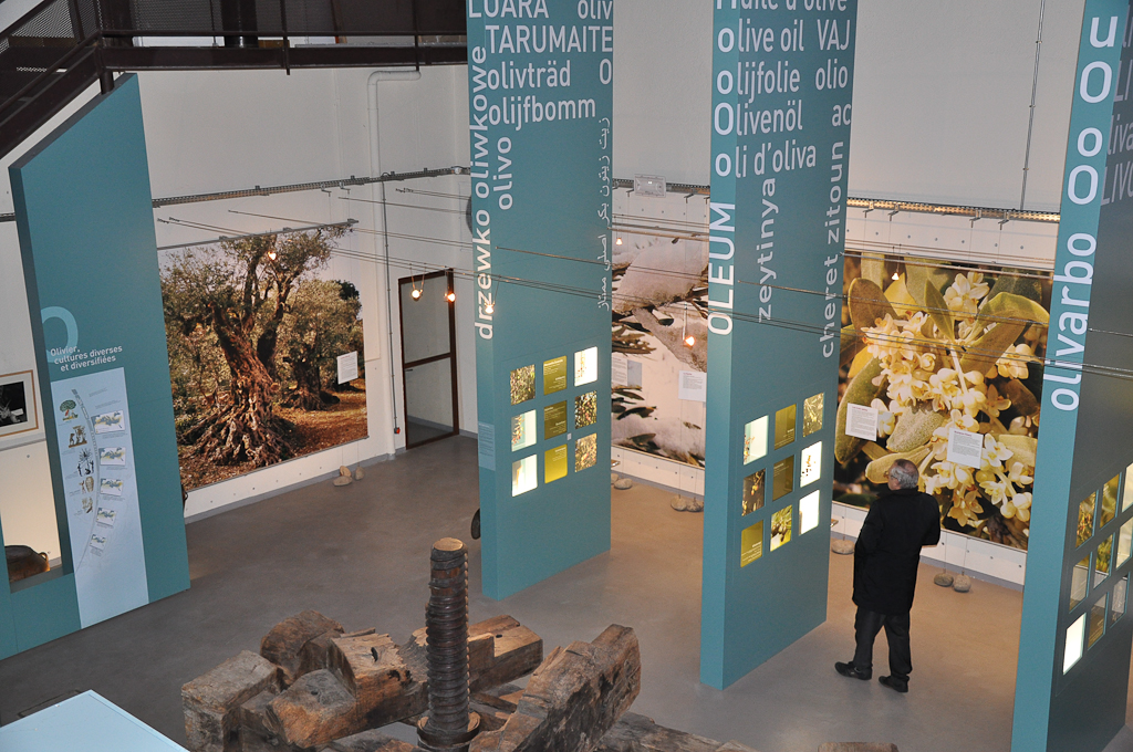 Panneaux d'exposition de l'Éco-Musée de l'olivier à Volx